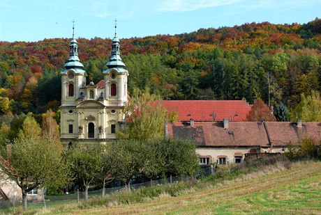 ročovské údolí